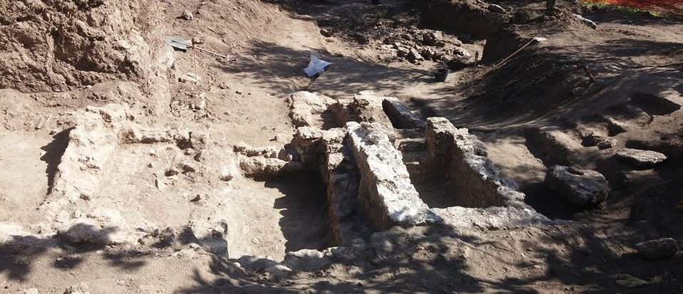 Scavi contrada San Vincenzo a Girifalco. Resti di un antico cimitero ebraico databile al VI o VII secolo D.C.